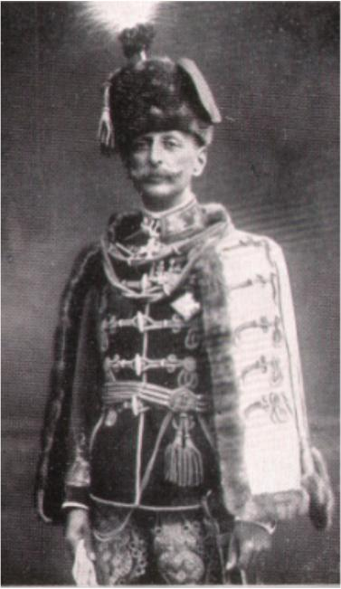 General der Infanterie von Sarkotic